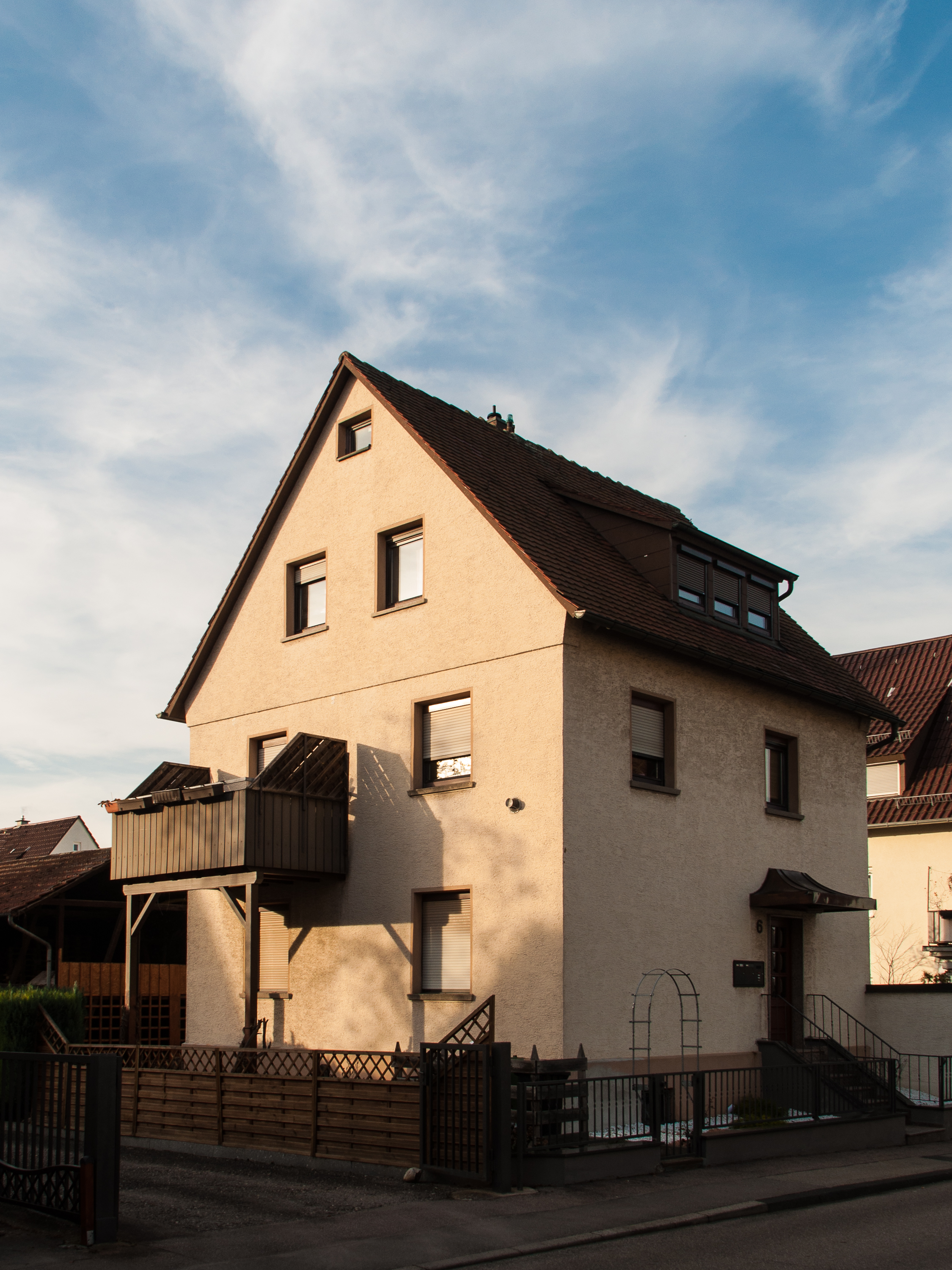 Wolfgang "Wolle" Kriwaneks Elternhaus in der Wolle-Kriwanek-Straße (vormals Wissmannstraße) in Stuttgart-Stammheim.